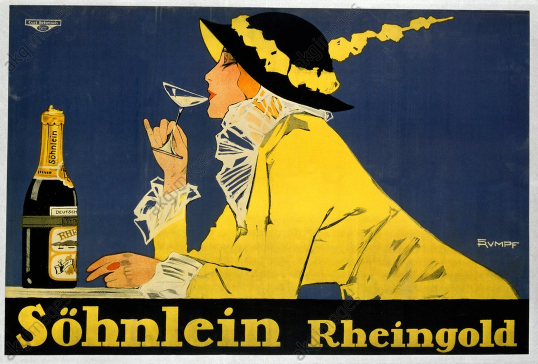 Söhnlein Rheingold / Werbeplakat um 1910. Farblithographie, 68,5 × 91,5 cm. Druck: Curt Behrends, Berlin